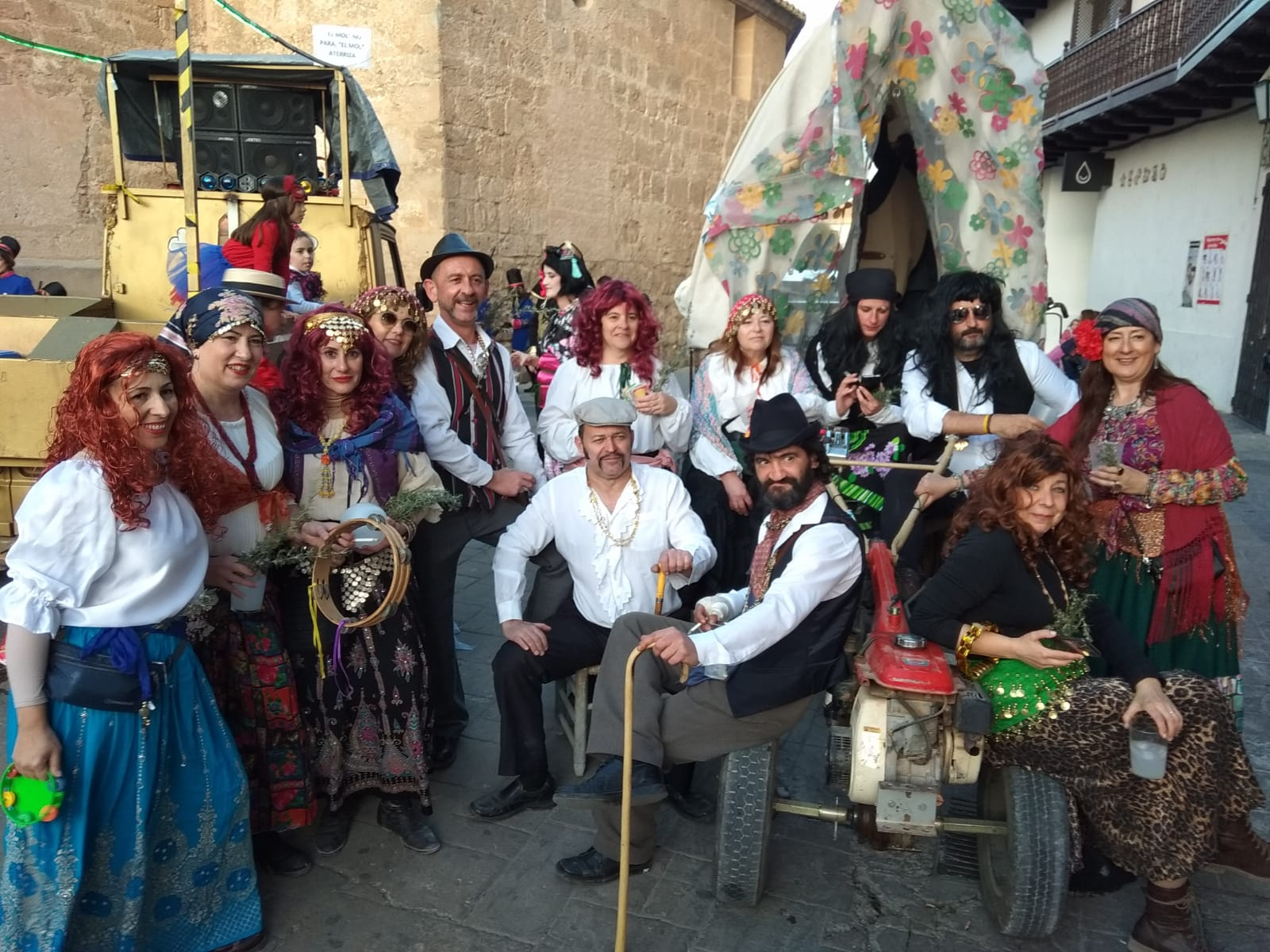 Peña: Los sin nombre (2019)